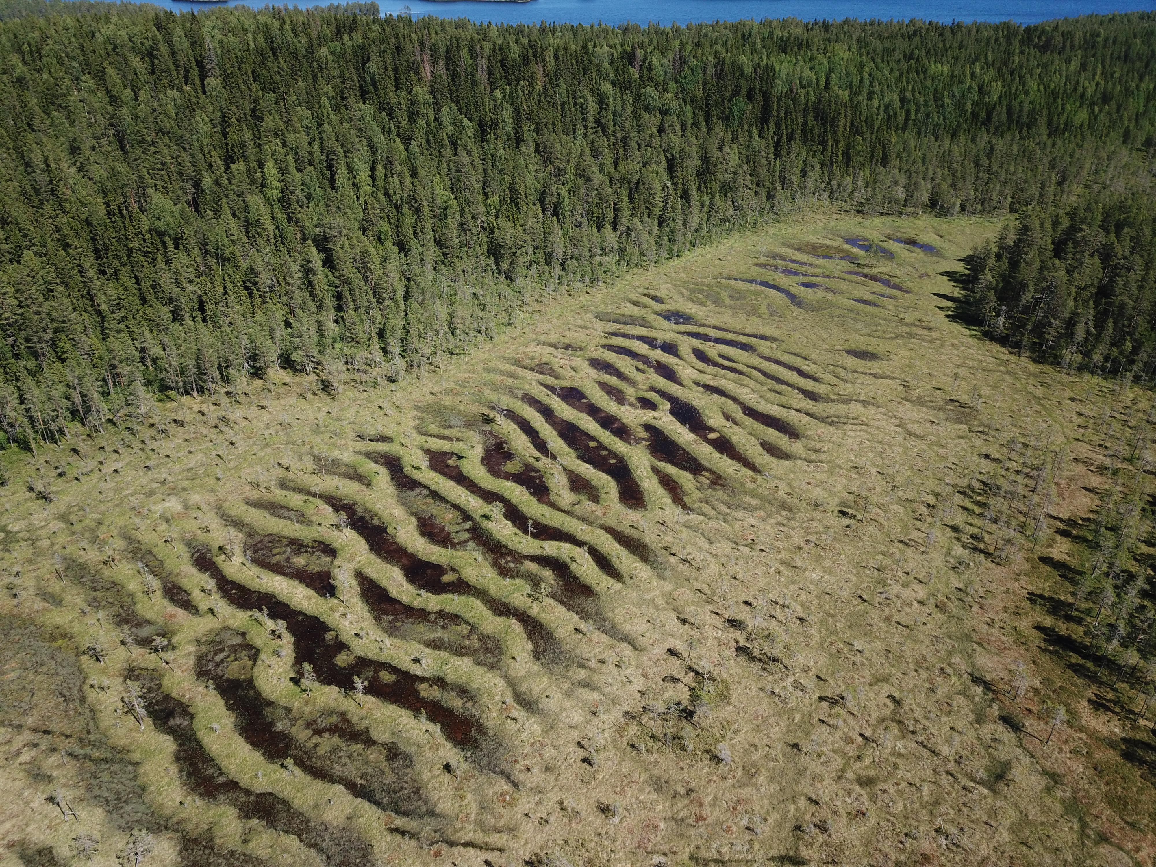 Flarksträngkärr i Västernorrlands län, Sverige. Flarkar är de blöta delarna och strängar de upphöjda torra delarn. Denna myrtyp är en del av aapamyr komplexet